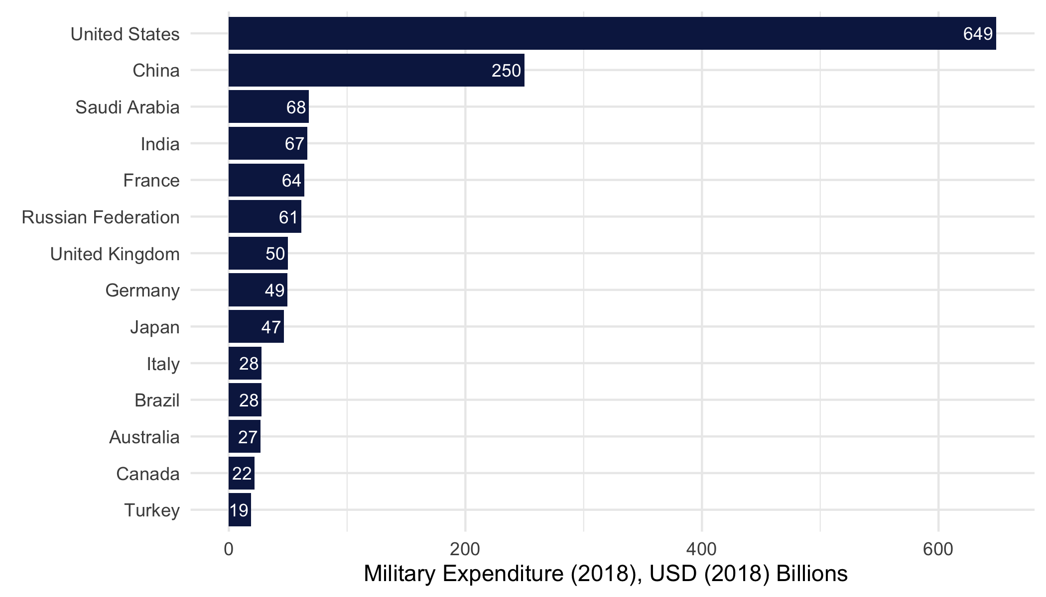 Länder mit höchsten Militärausgaben in 2018 in 2018 US-Dollar. Quelle: Stockholm International Peace Research Institute